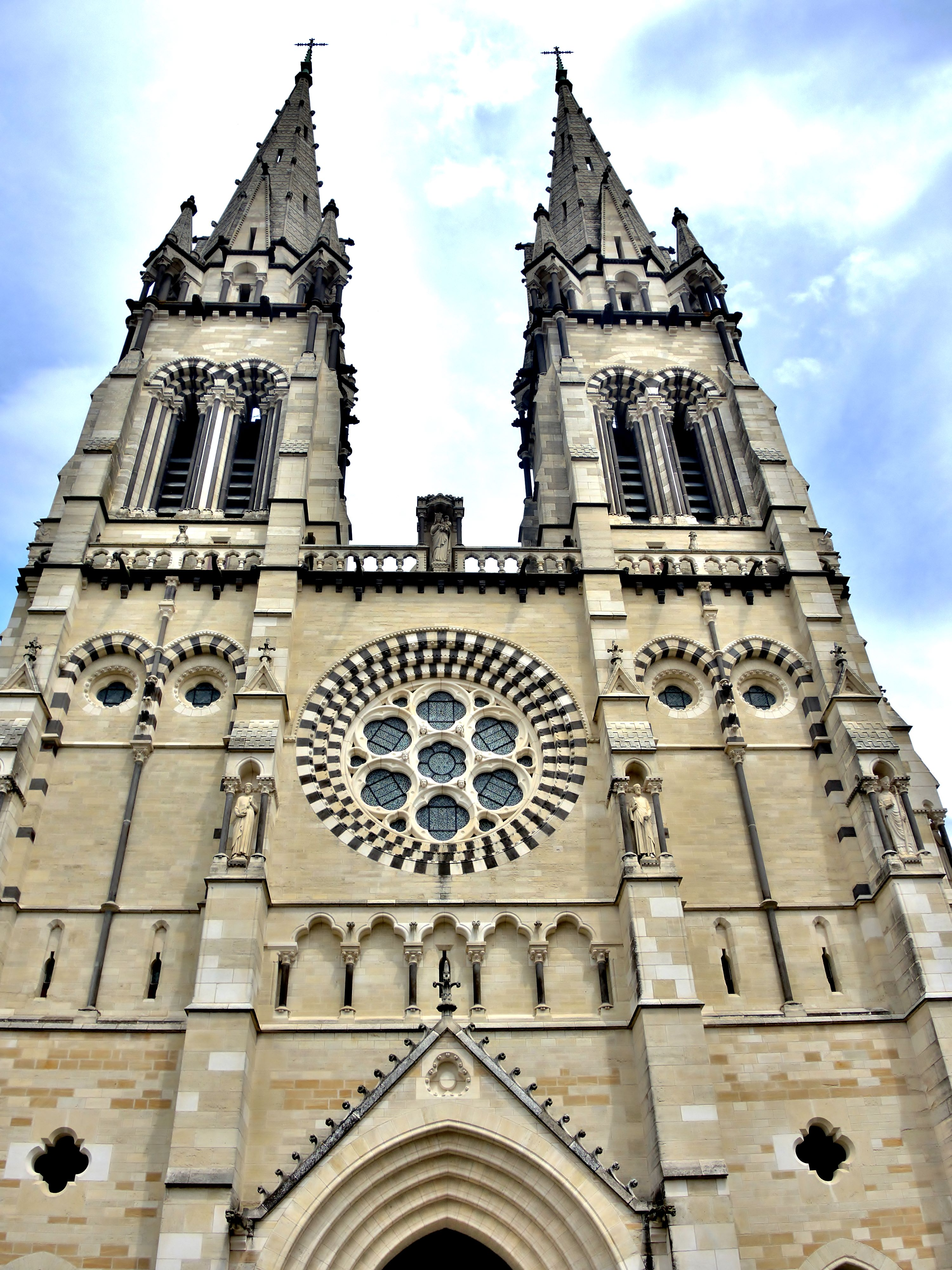 Façade et flèches de la cathédrale de Moulins. Allier